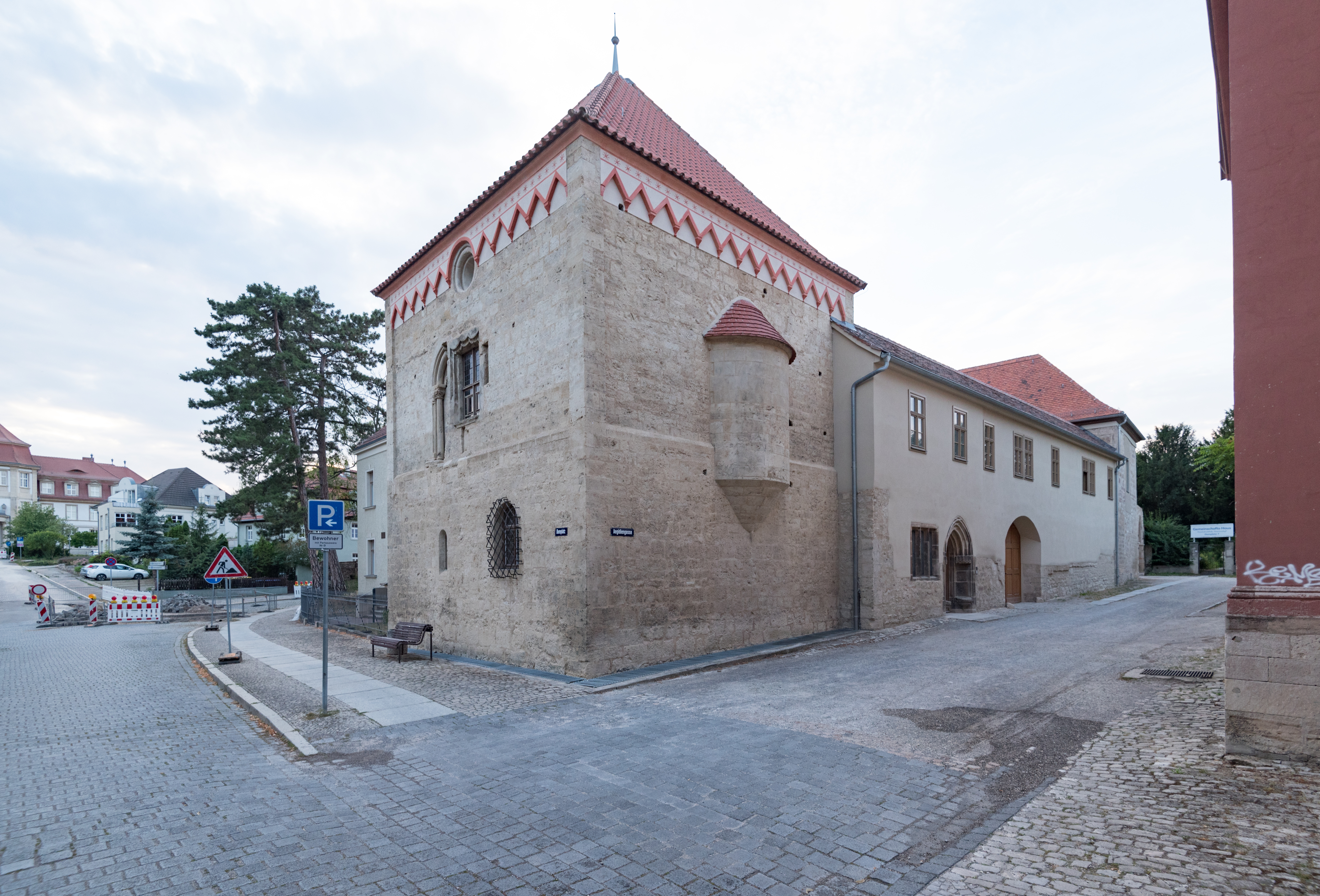 Naumburg (Saale), Domplatz 8